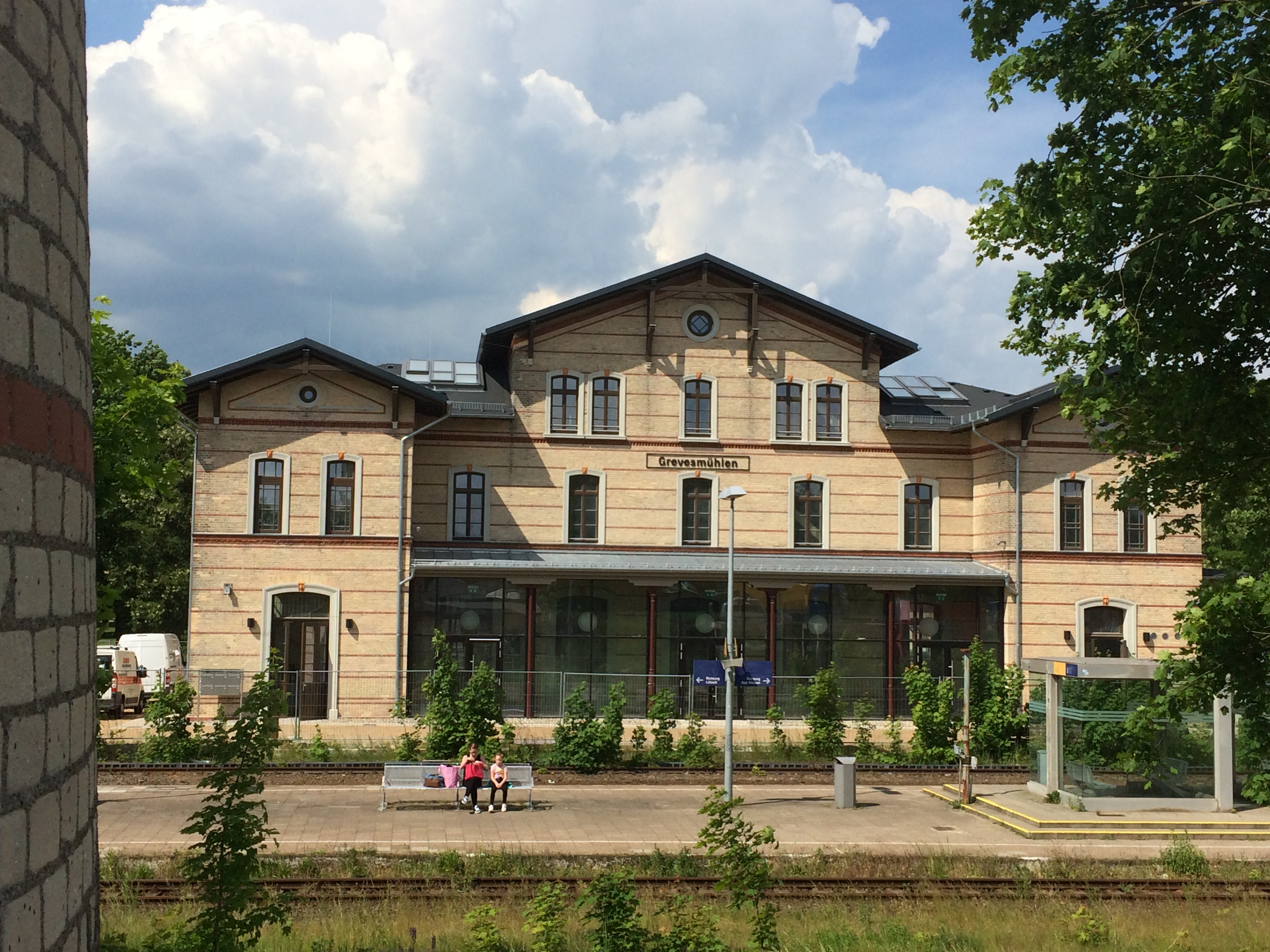 BürgerBahnhof